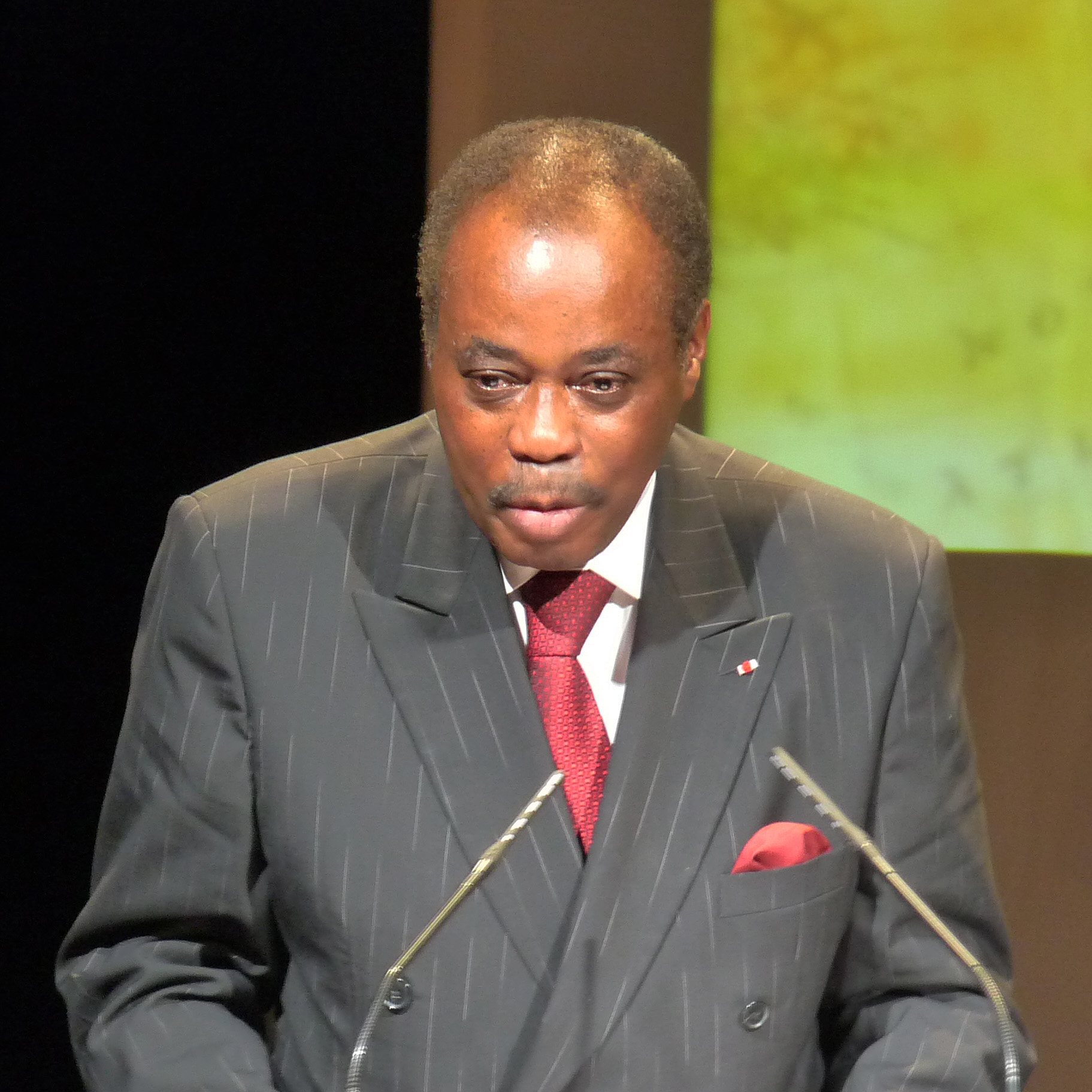 Edem Kodjo, ancien Premier ministre du Togo, président du 22e Festival international de géographie de Saint-Dié-des-Vosges 2011